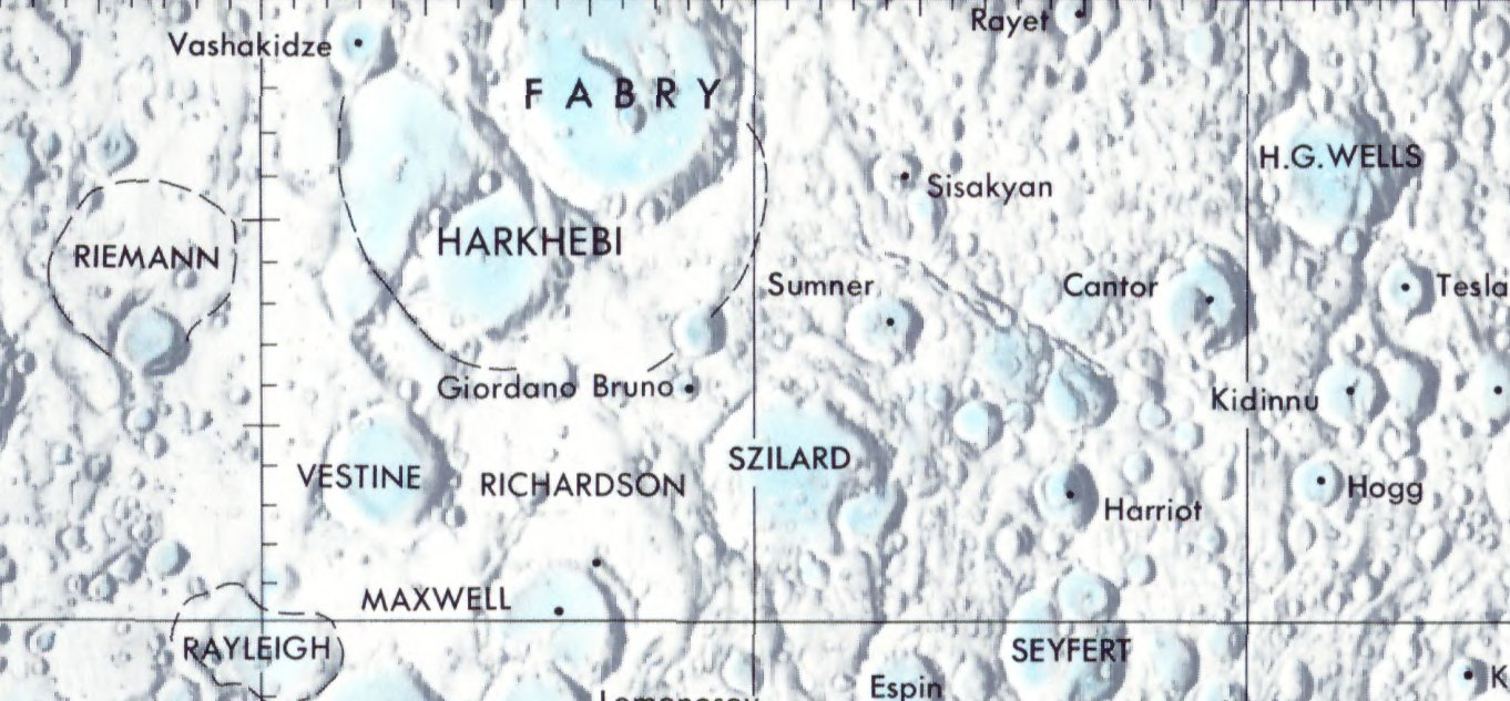 Cráter lunar Sisakyan. Localización. (Lunar Chart LPC1. Second Edition)